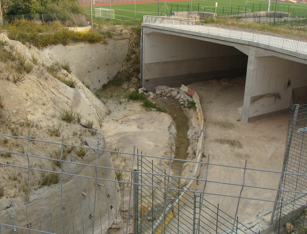 L'entrée nord du tunnel de l'A507 au sud du vallon de la Fourragère, état octobre 2012.